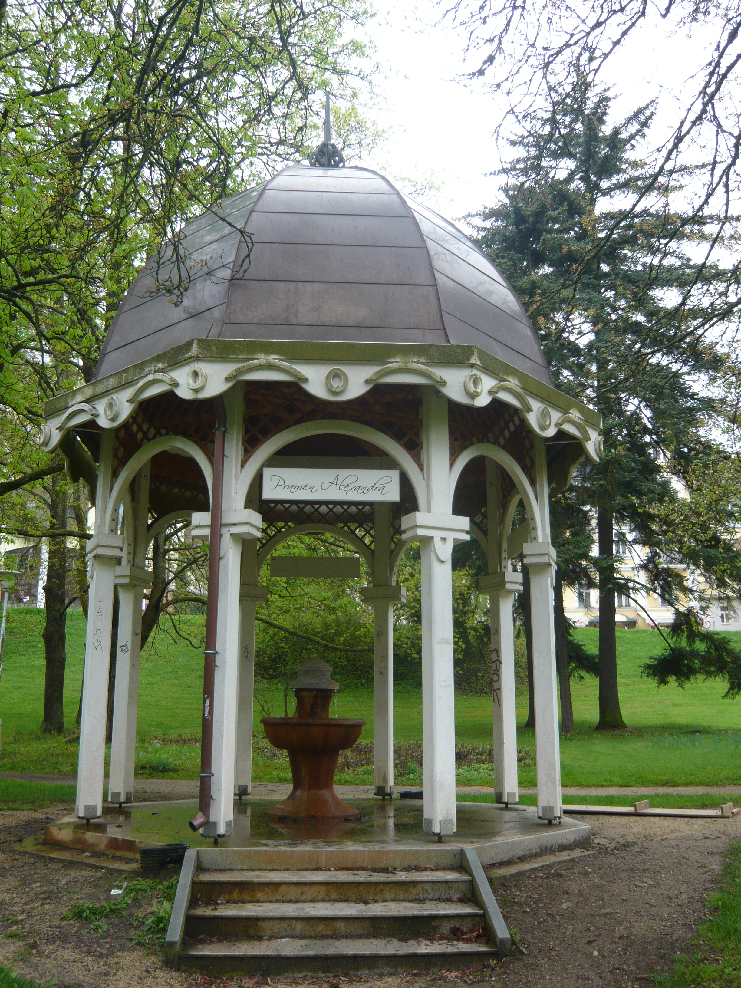 Alexandřin pramen, Mariánské Lázně